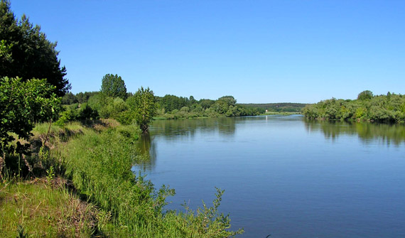 Rzeka Bug w Drohiczynie.